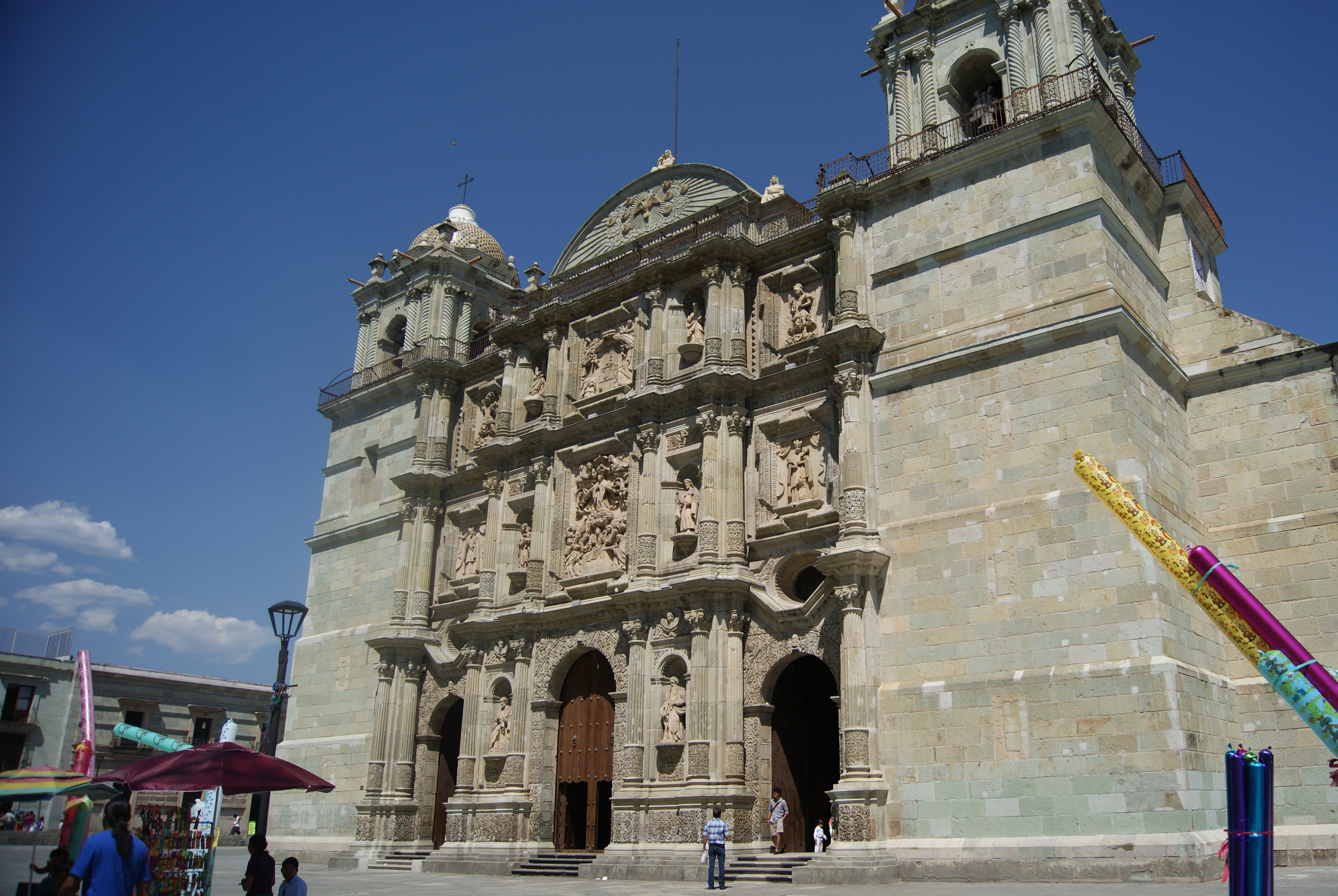 Catedral de Nuestra Señora de la Asunción, Oaxaca, Oax.